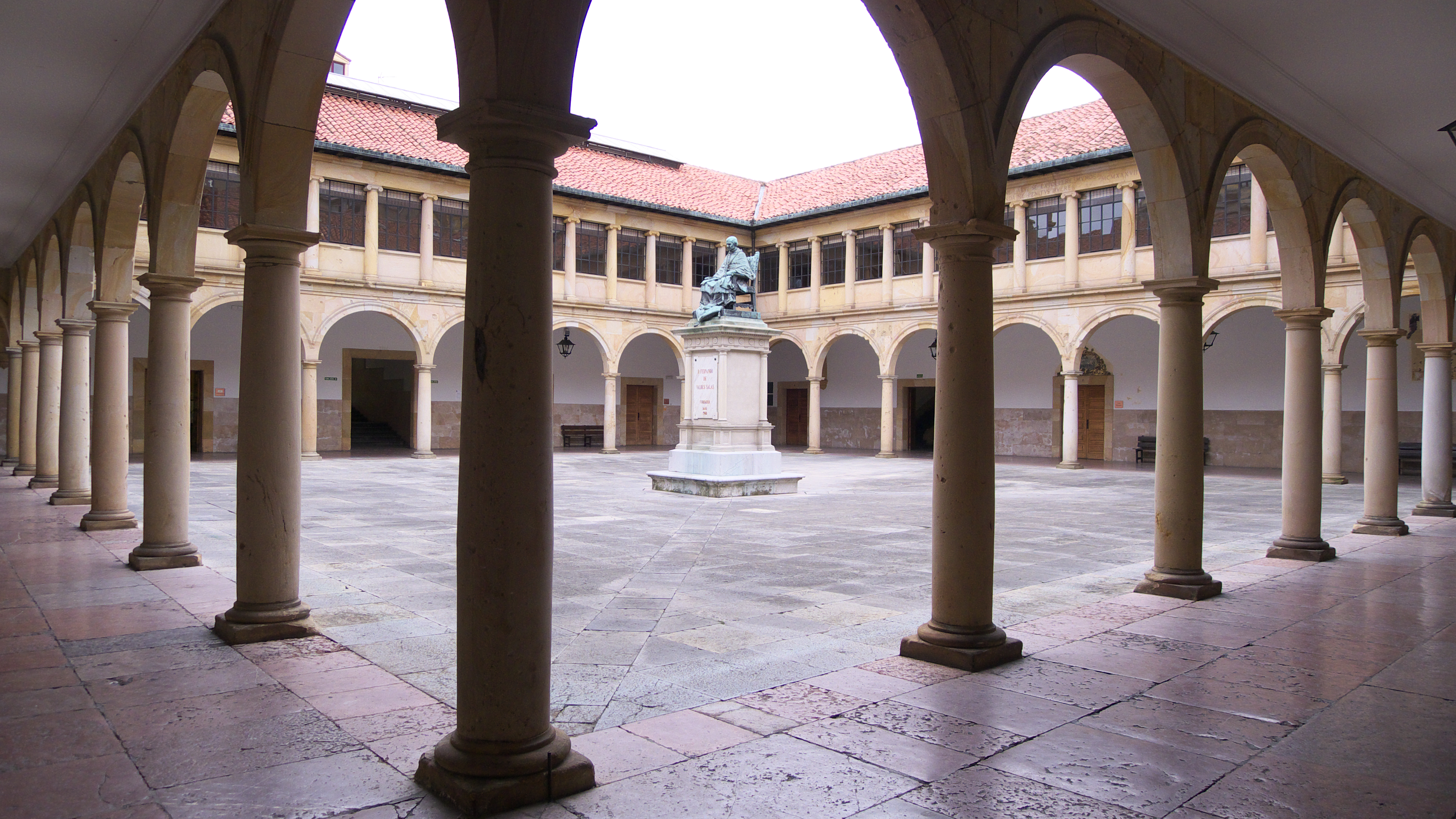 El Arzobispo de Sevilla, Fernando de Valdés y Salas (1483-1568), testa una Universidad (Artes, Cánones, Leyes y Teología); un hospital para estudiantes y, un colegio para niñas huérfanas recoletas. Rodrigo Gil de Hontañón traza el edificio en el 1574, siendo inagurado el 21 septiembre 1608.